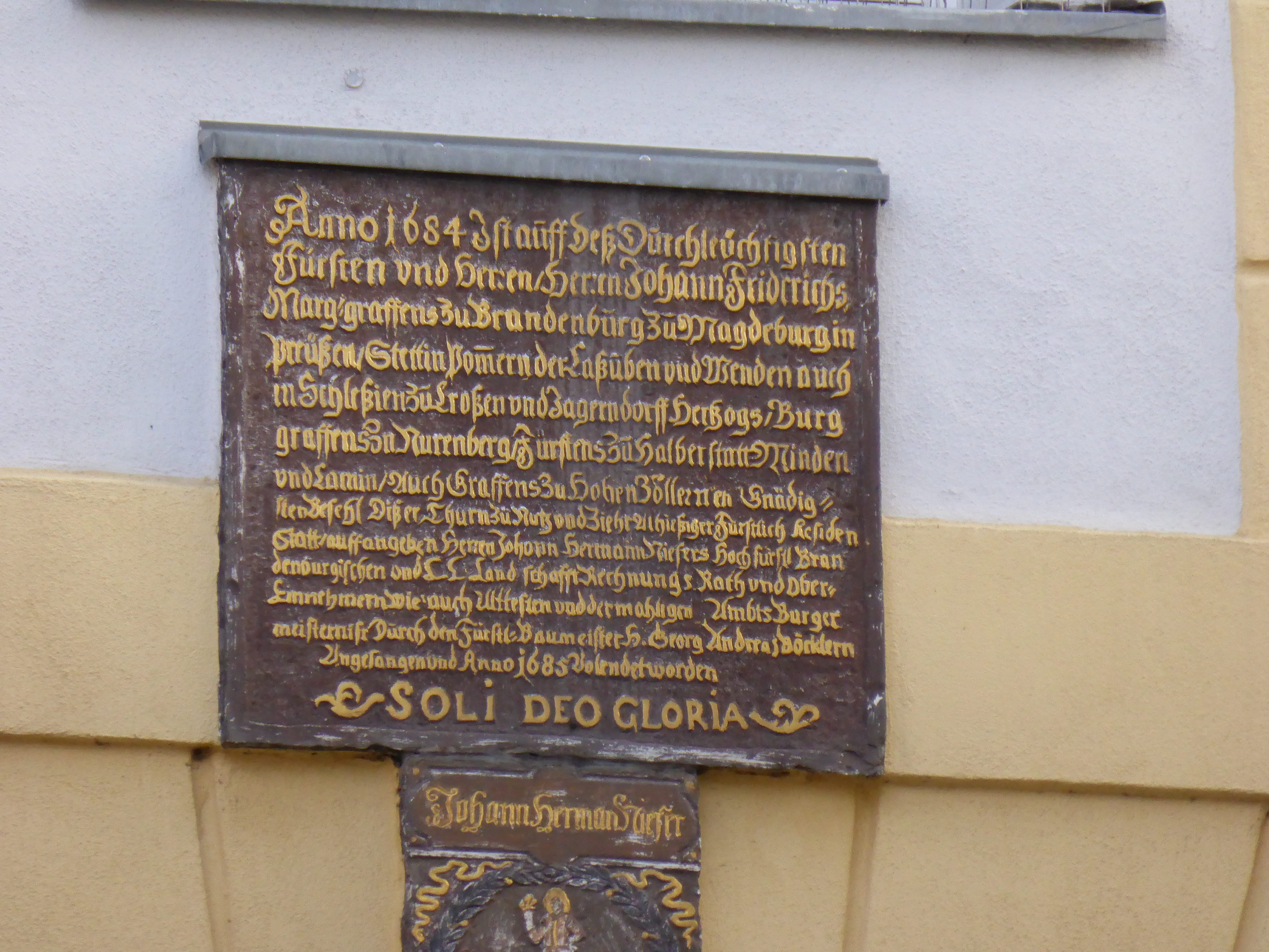 Germany, Bayern, Ansbach, Uzstraße 30